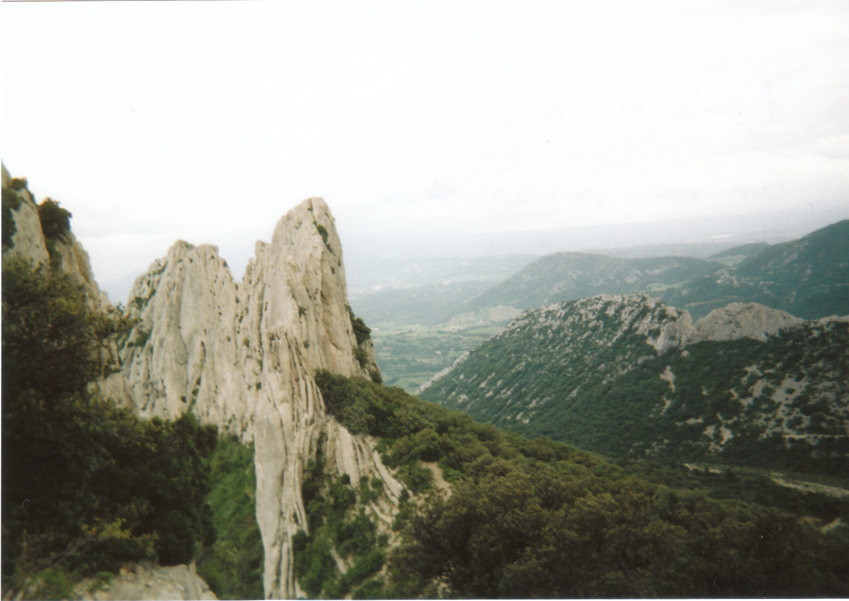 vue dans l'ascension pédestre vers les Dentelles de Montmirail, Dent Hadamard